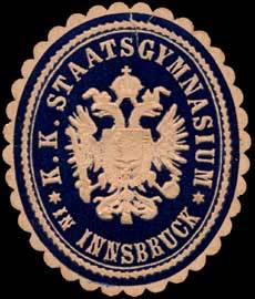 Sealing stamp Title: K.K. Staatsgymnasium in Innsbruck Description: dunkelblau, rosa, geprägt Place: Innsbruck size: 4x4 cm